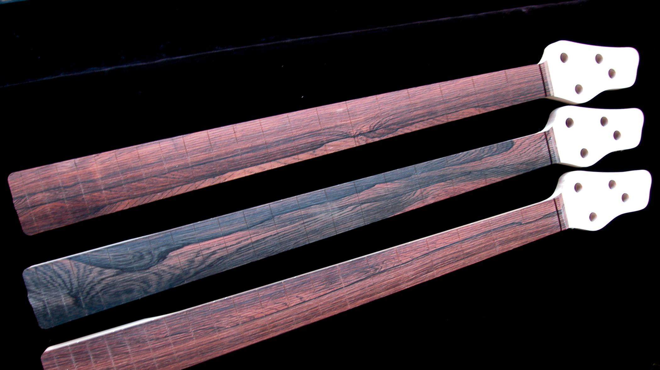 Rob Allen Solid 4 Electric Bass Guitar necks (8309173288)